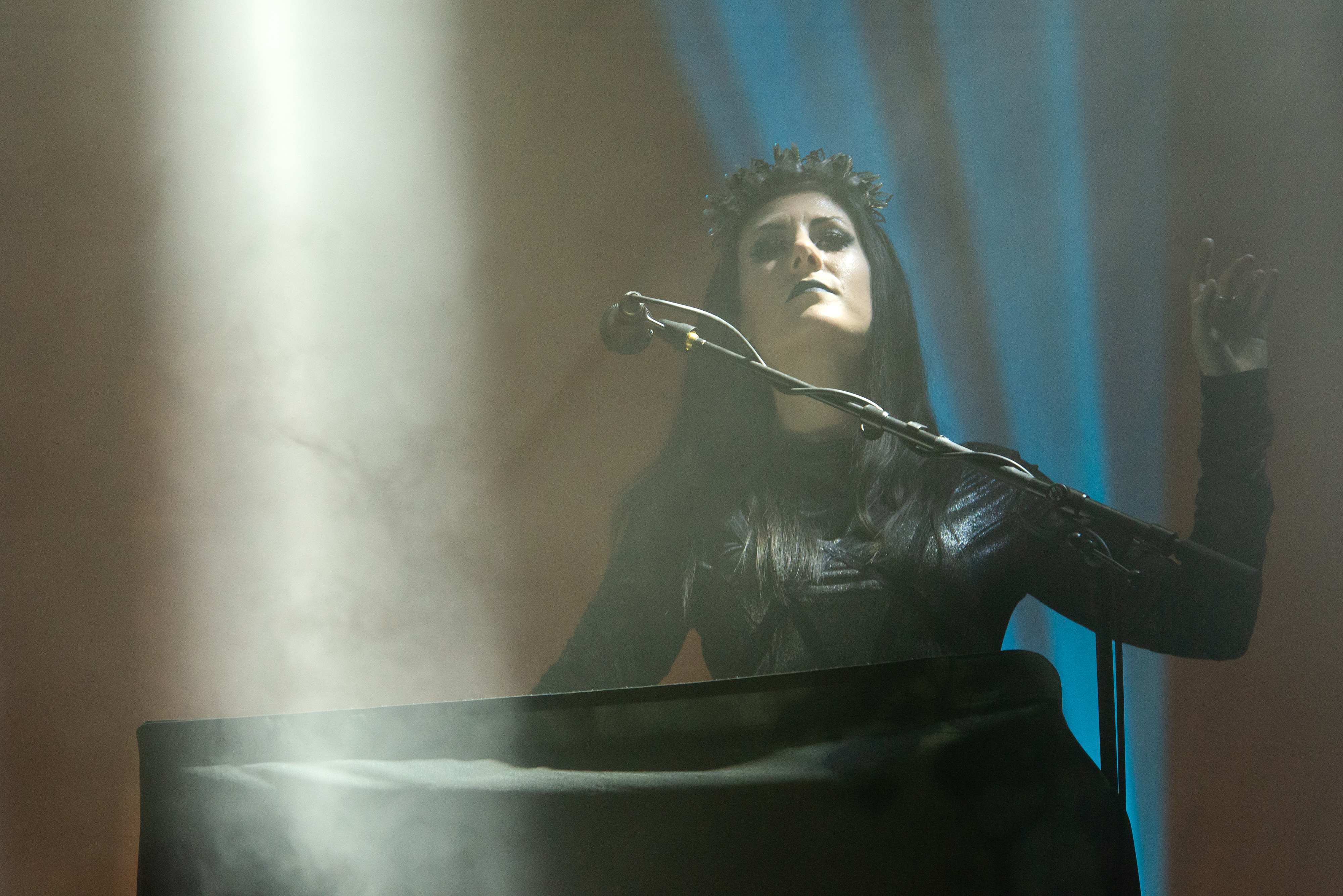 Concert du groupe britannique Cradle of Filth au Hellfest 2019.